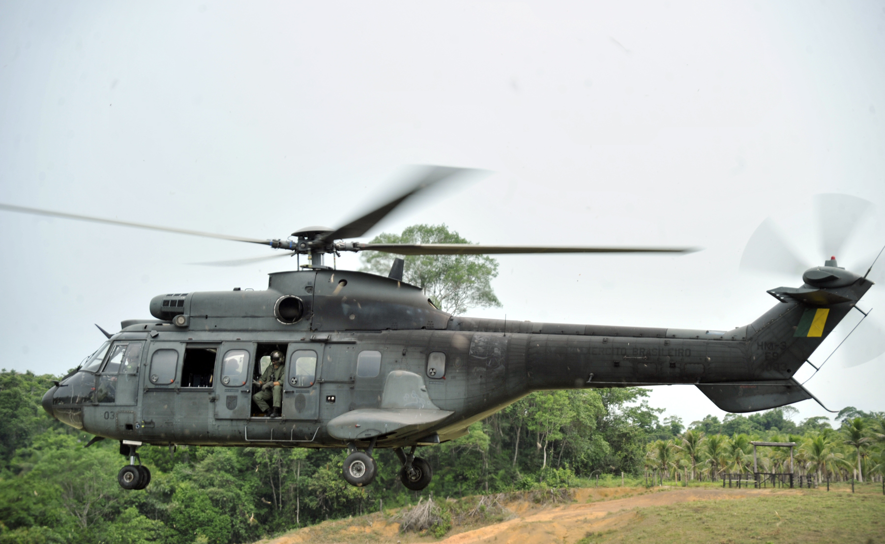 Helicóptero pousa em Paricatuba (AM), onde ocorreu a Operação Amazônia 2012, 26/09/2012 Foto: Tereza Sobreira